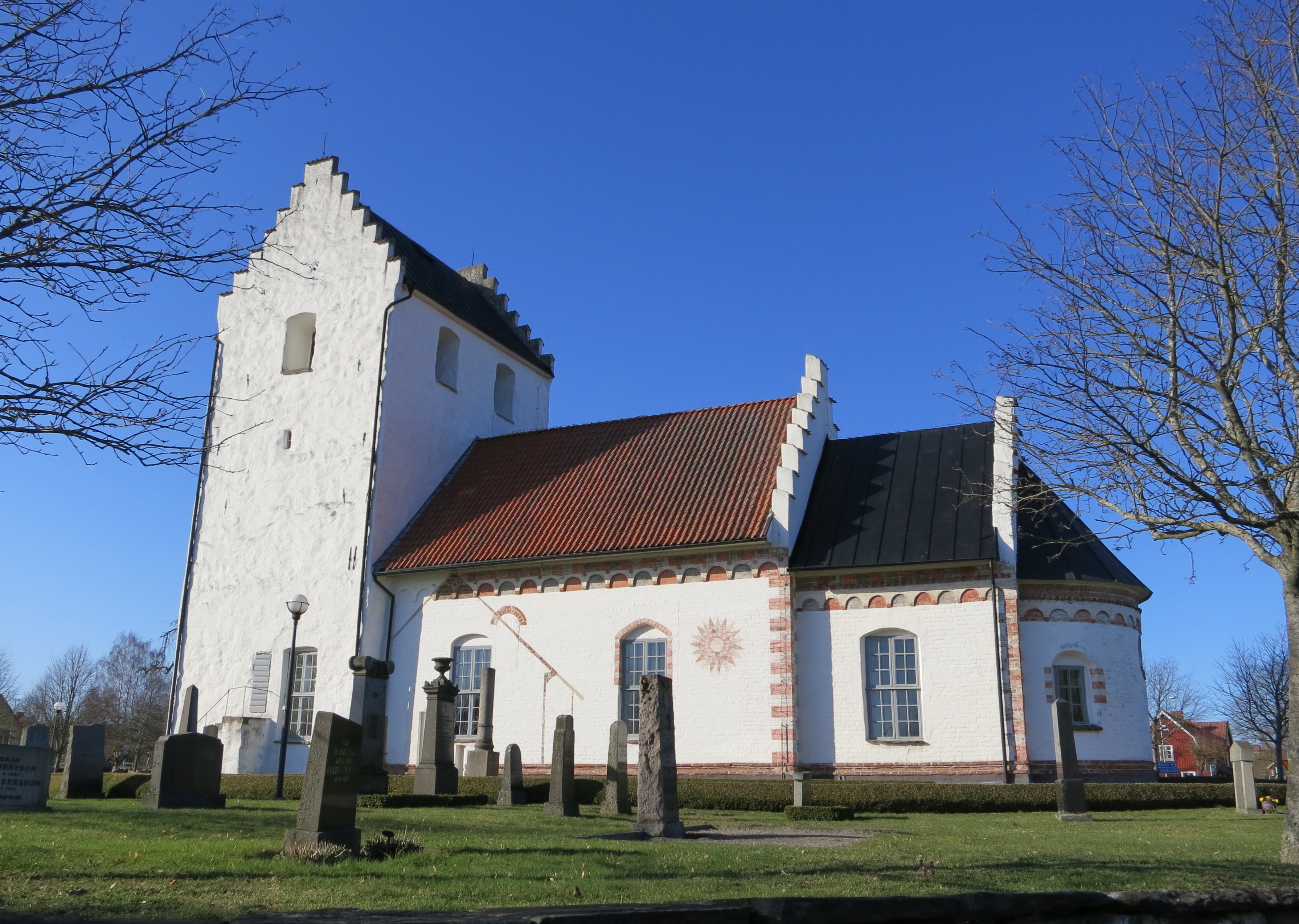 Hjärsås kyrka, mars 2014